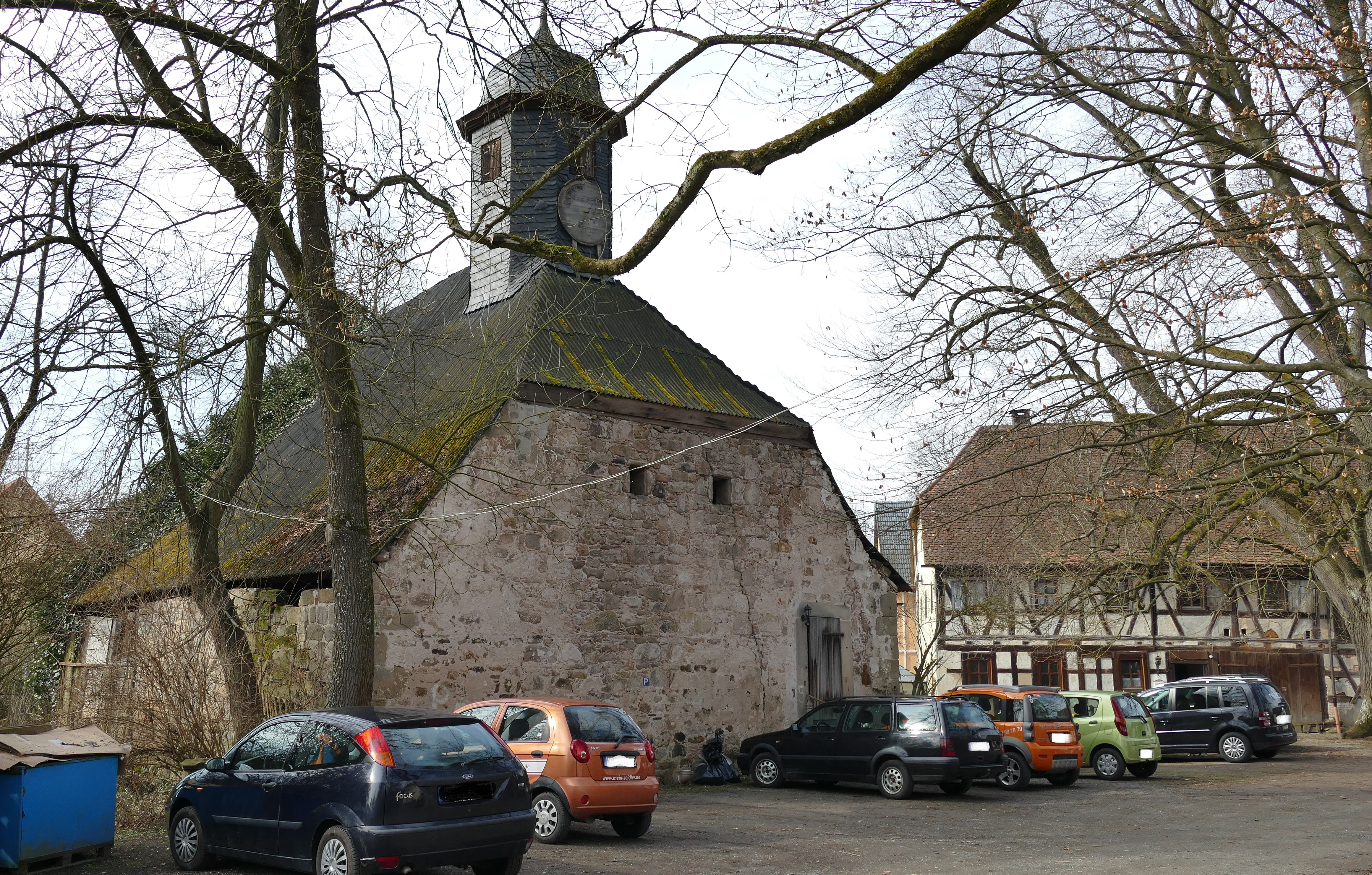 Schmeilsdorf, ehemalige Kapelle beim Schloss